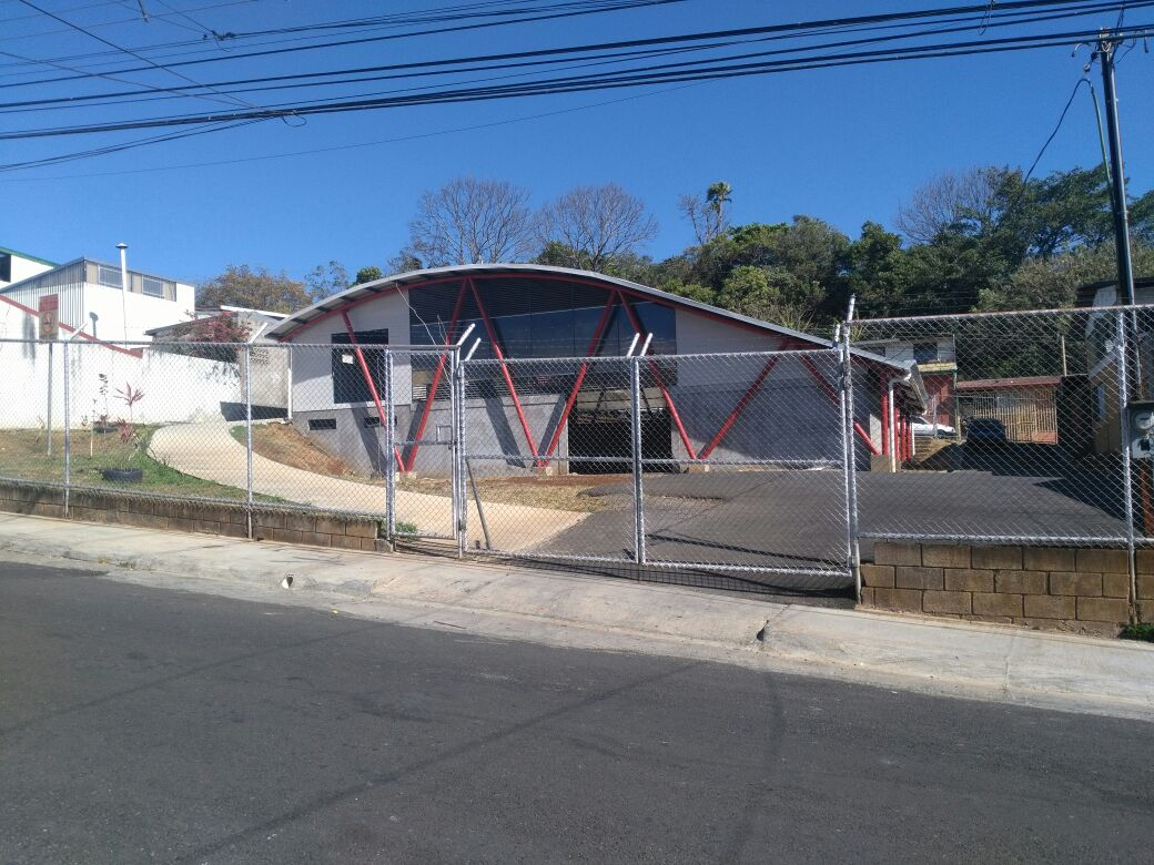 Foto del salón comunal de La Brasilia